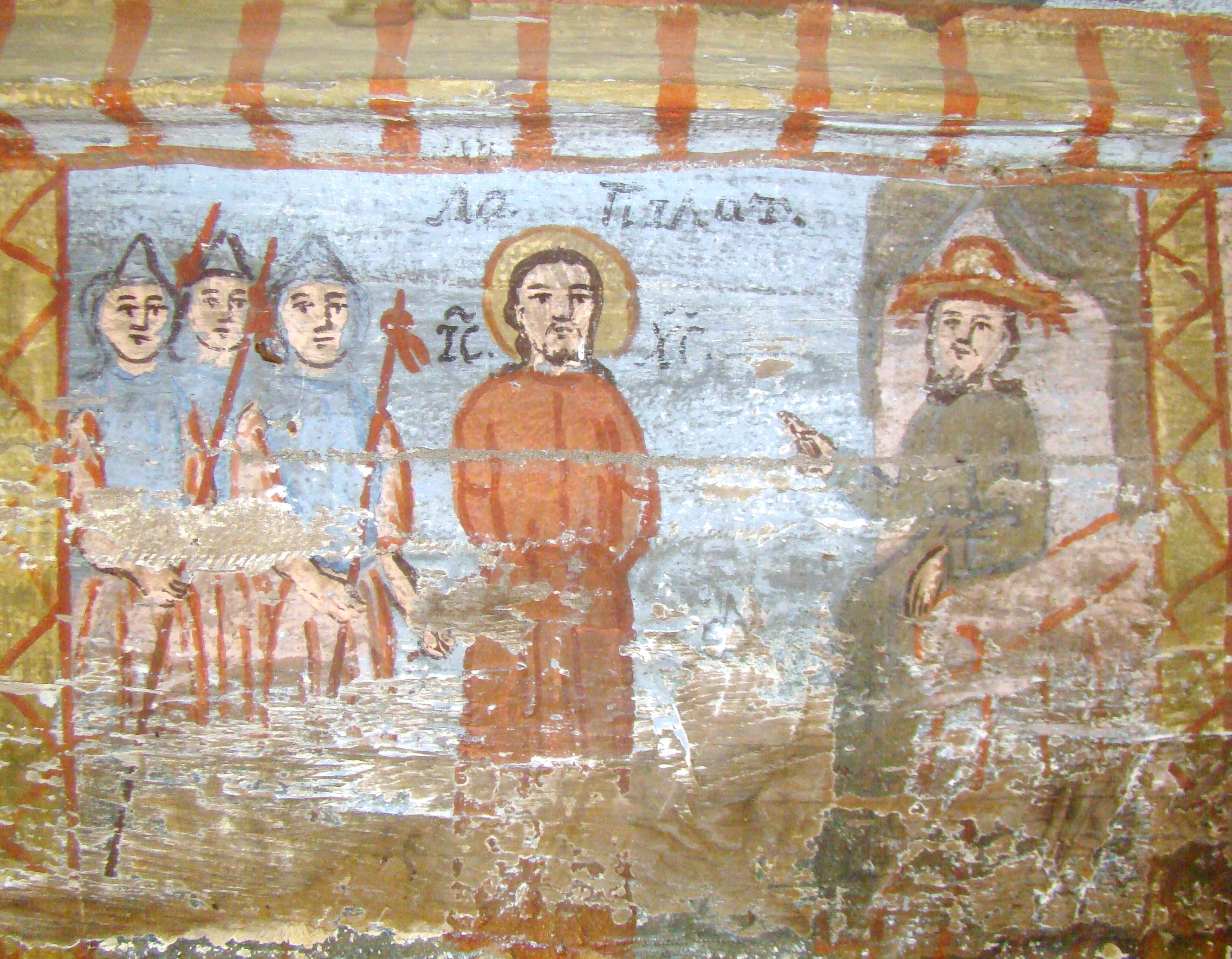 Biserica de lemn "Cuvioasa Paraschiva" , sat STEJERA; comuna MIREŞU MARE